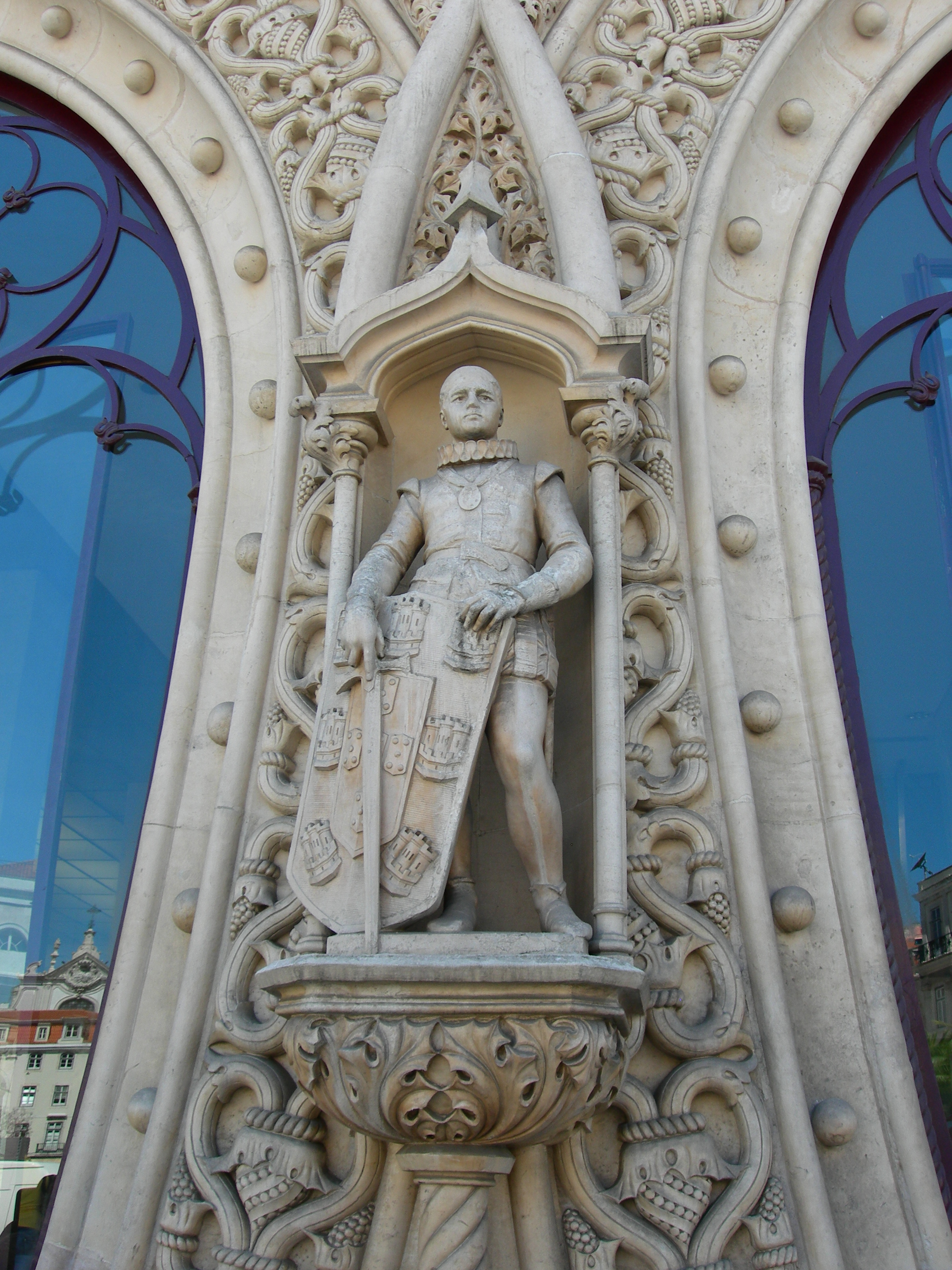 Estação do Rossio (Lisboa) II This file was uploaded for Wiki Loves Monuments in Portugal with the unique identifier 71830.